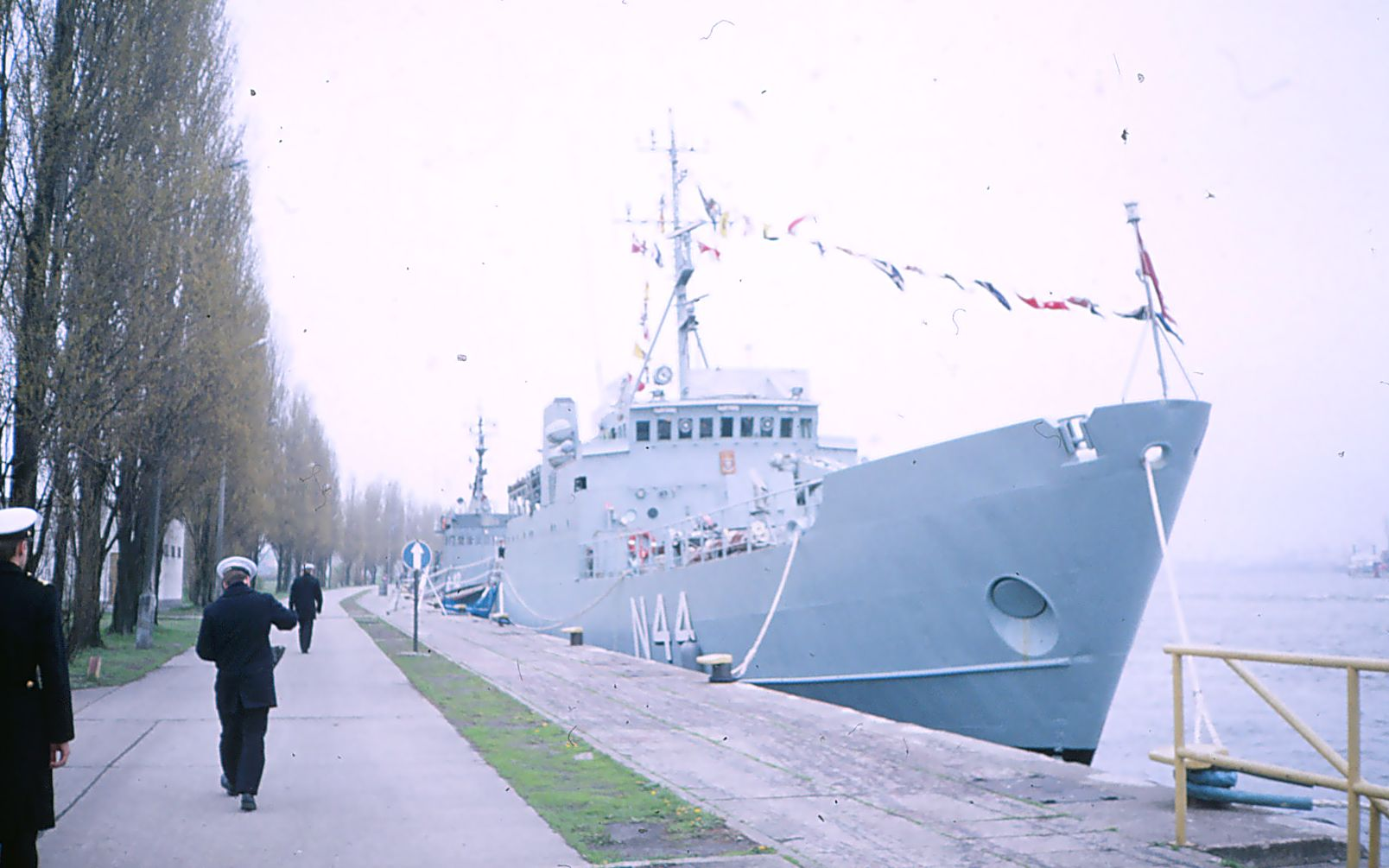 Den danske kabelminelægger N44 Lossen på besøg i flådebasen i Schwinoujche i Polen, Maj 1996.